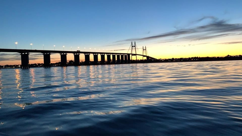 Amanecer en el Río Paraná, vista al puente Rosario-Victoria